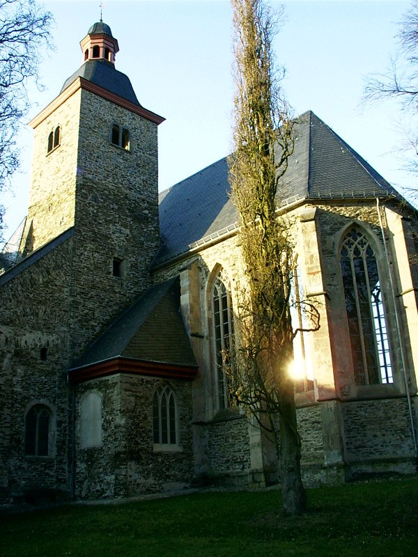 Rommersdorf, blick auf die rekonstruierte Kirche und den Turm